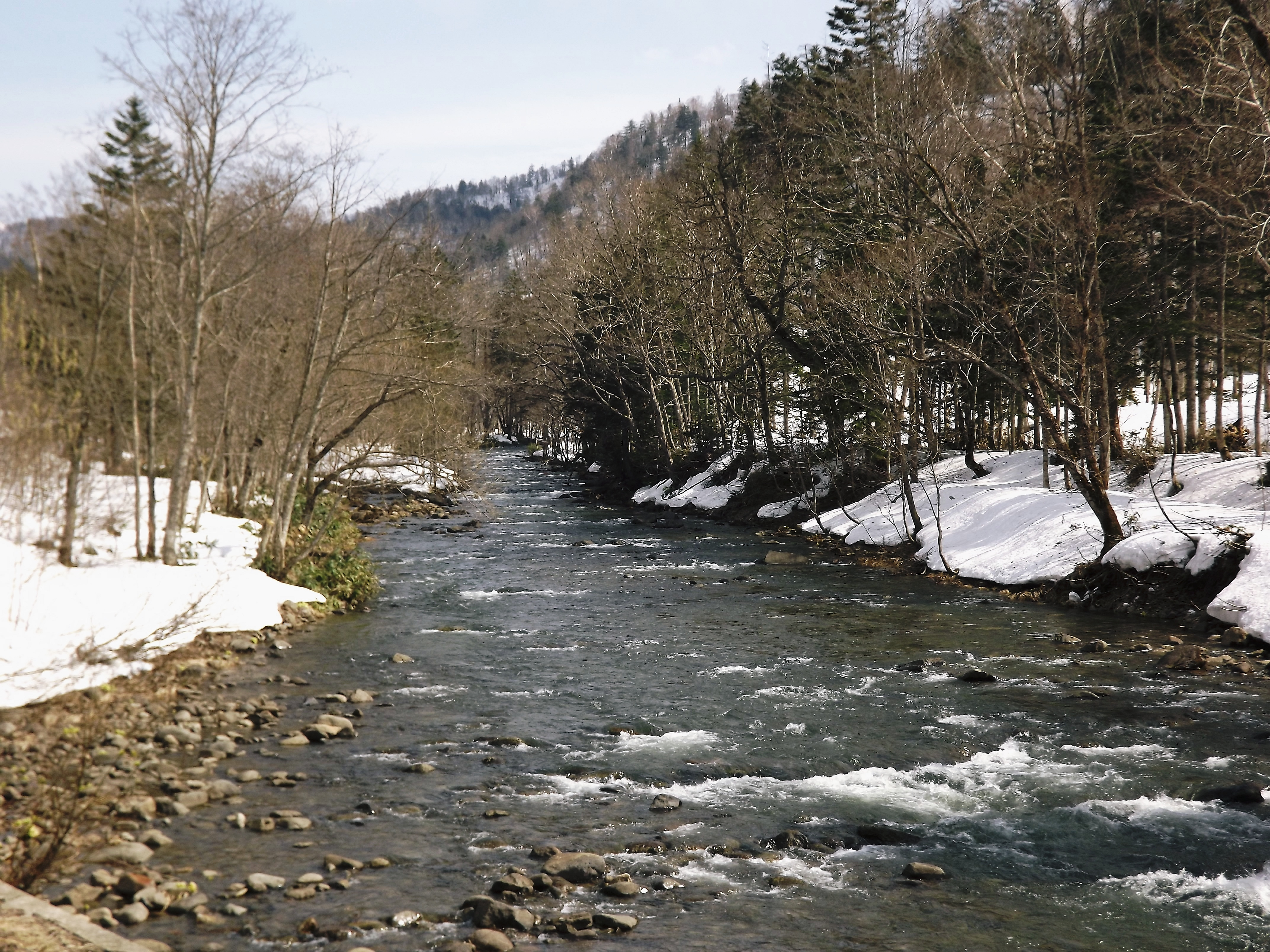 天塩川（岩尾内湖上流）